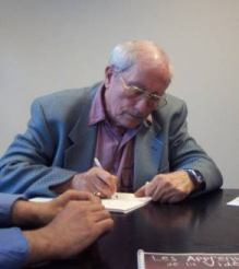 René Borg en dédicace lors du festival vidéo d'Orléans 2004